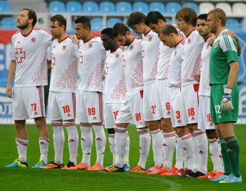 Гравці ФК Волинь Луцьк у 2013 році